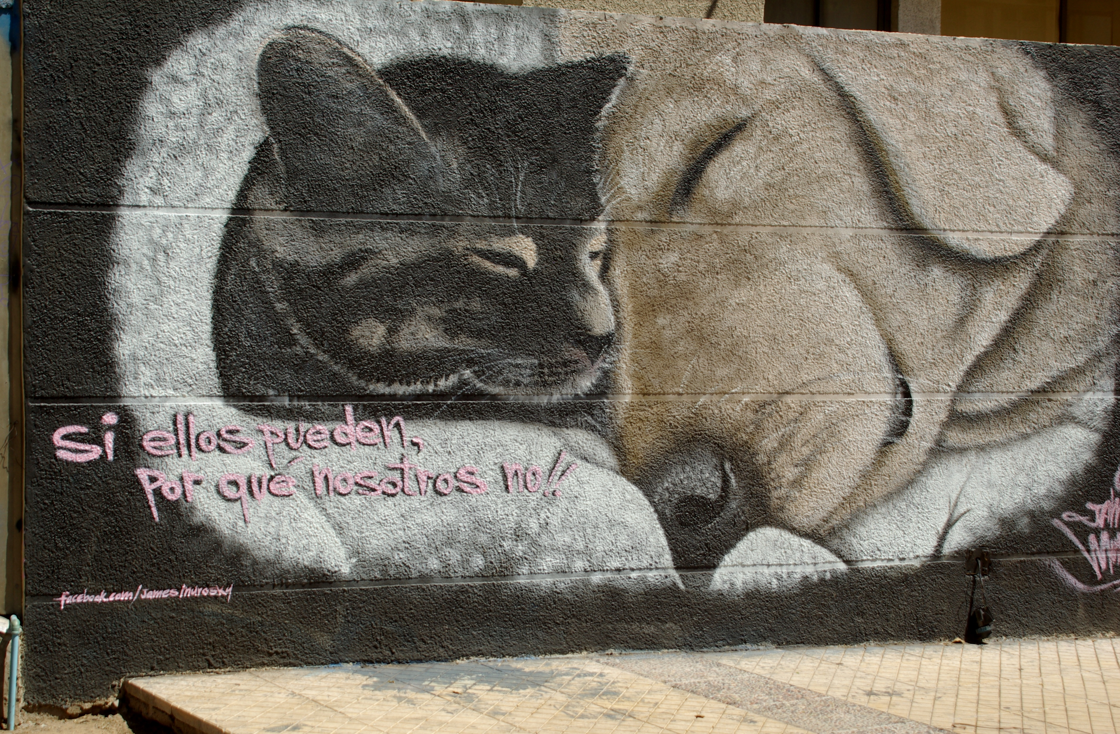 Grafiti de gato con perro (“Si ellos pueden, por qué nosotros no!!”) pintado por James Murosky en la calle Dardignac (acera sur, entre Pío Nono y Ernesto Pinto Lagarrigue) en el barrio Bellavista, Santiago de Chile